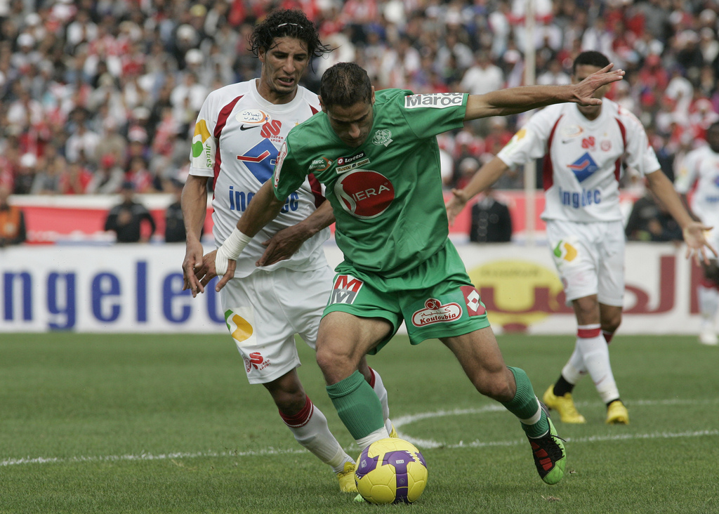 RCA vs WAC